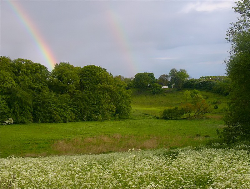 Syltemae ådal